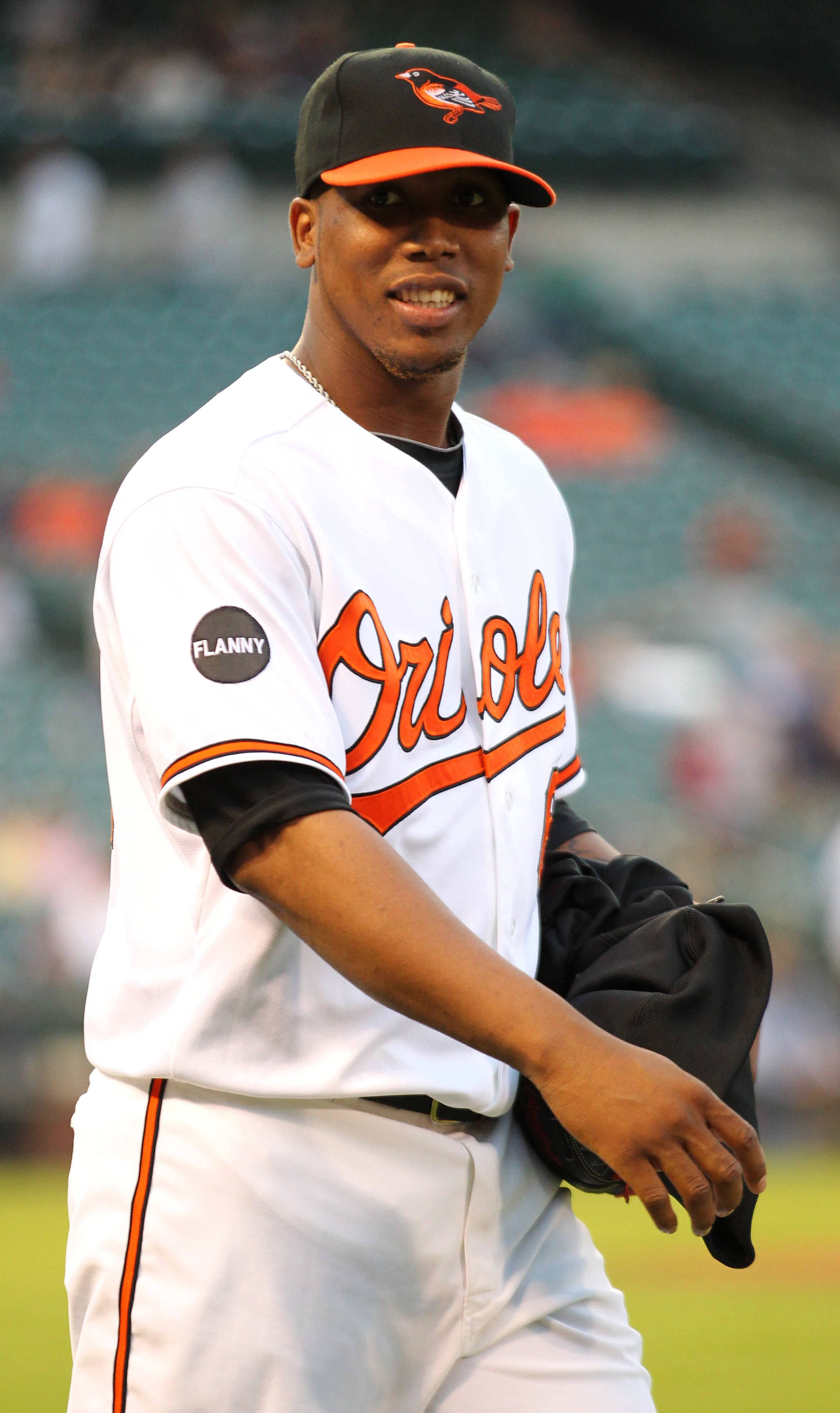 Pedro Strop